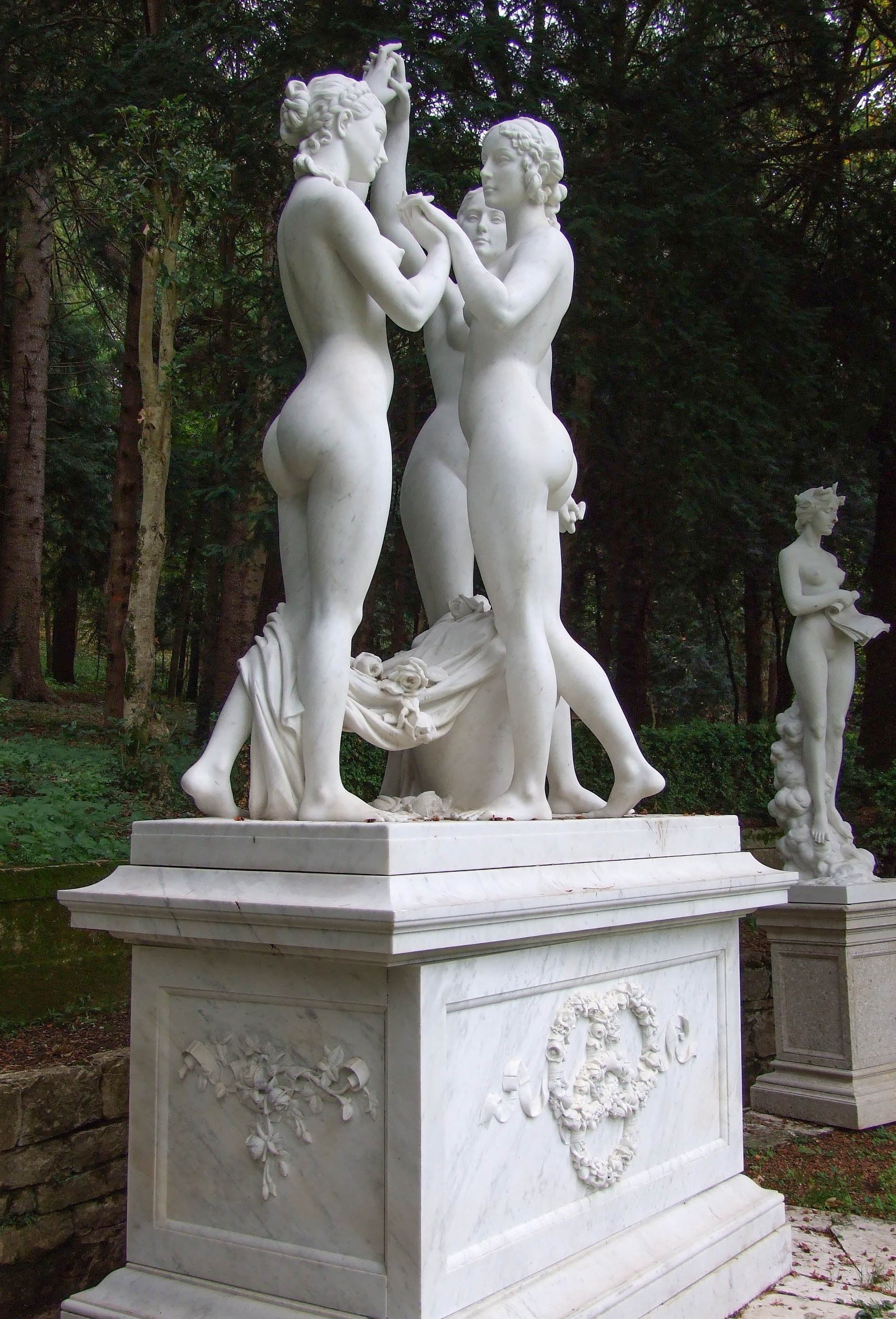 Villa d'Ayala - MIBAC This is a photo of a monument which is part of cultural heritage of Italy.